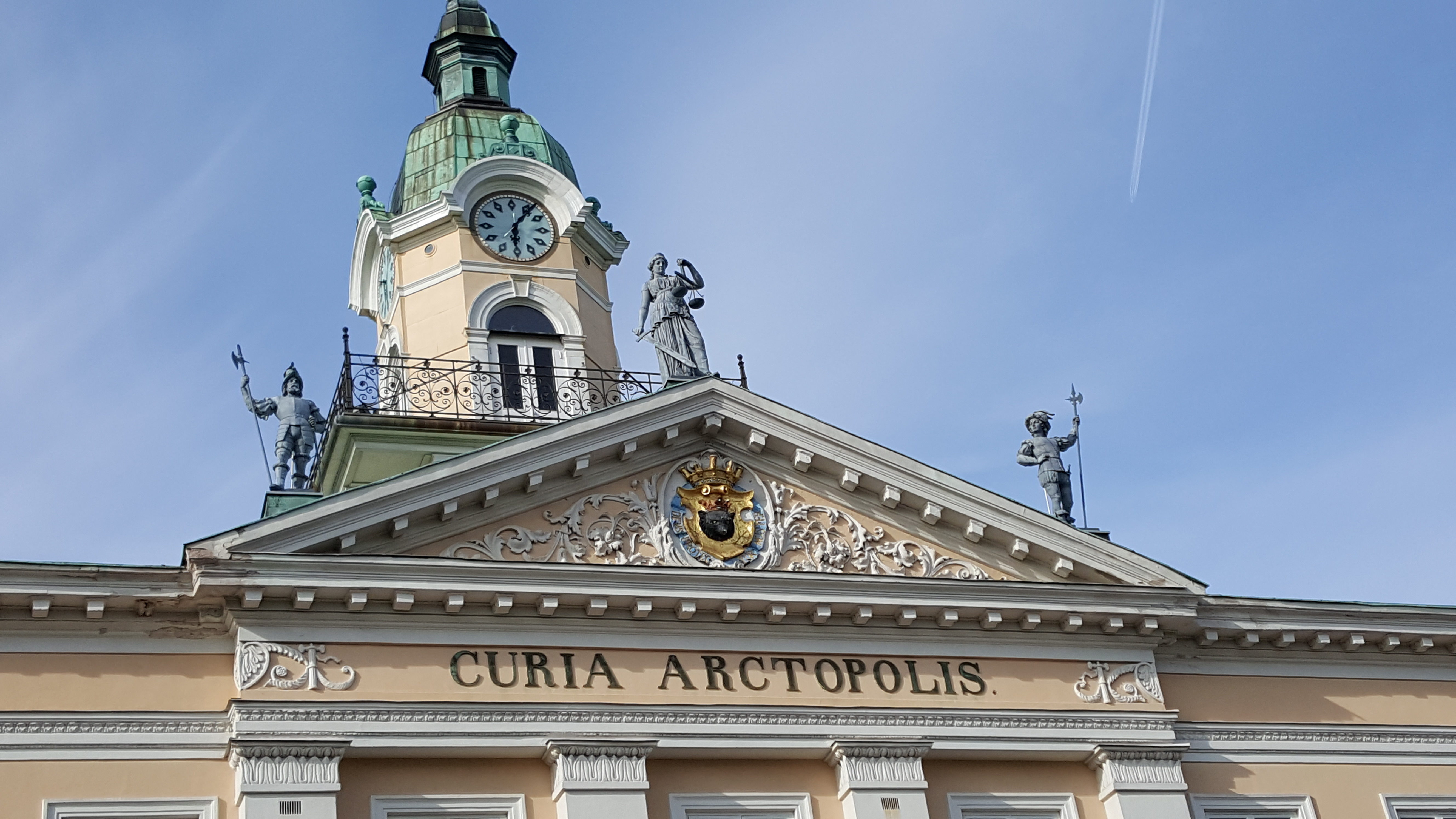 veistoksia